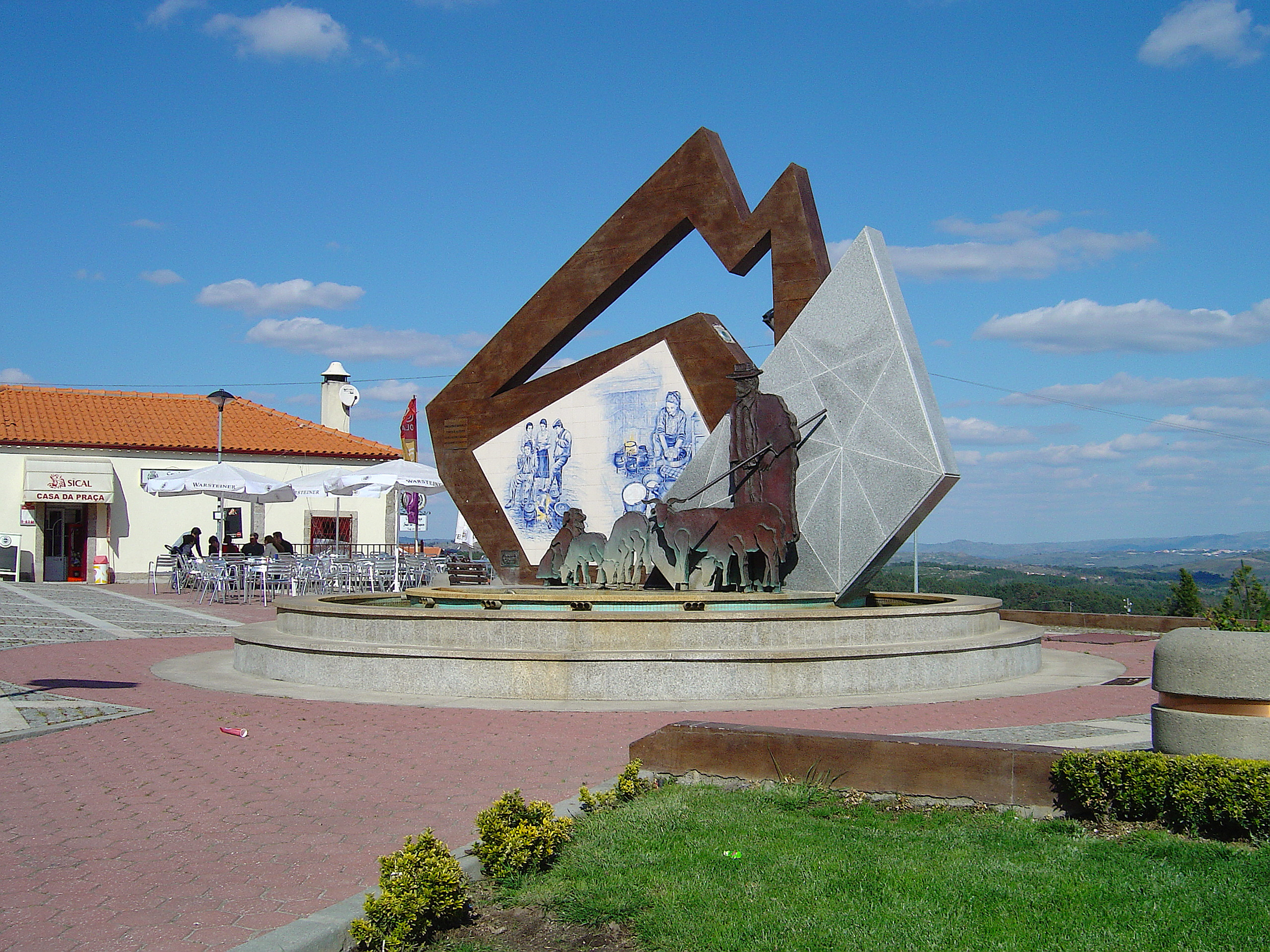 Monumento ao Pastor da Serra da Estrela - Fornos de Algodres Fotografia de Vitor Oliveira, integrada na colecção com o endereço